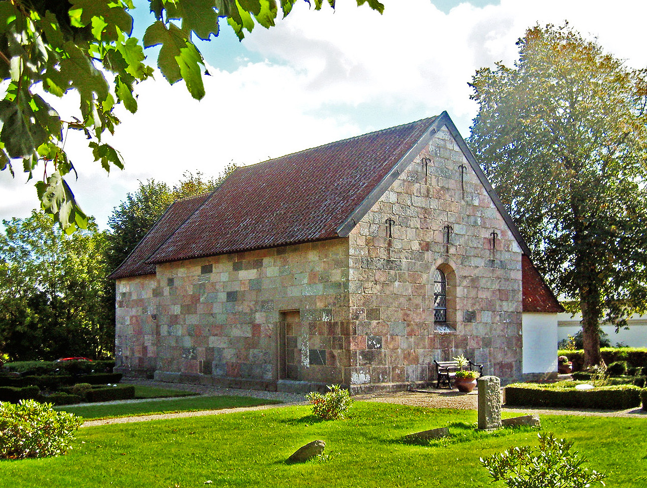 fra nordvest